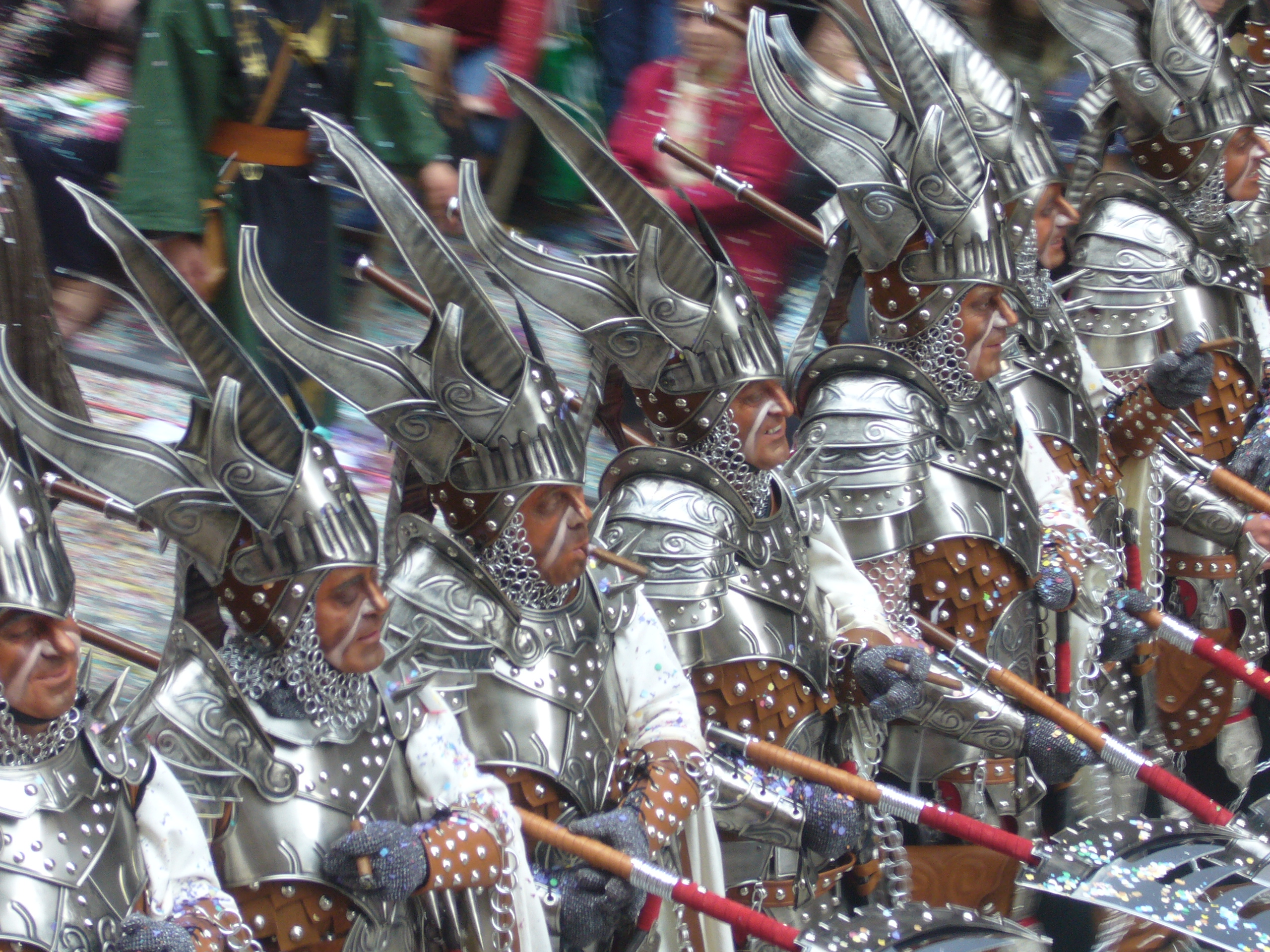 escuadra de negres alferecia alcodianos 2007